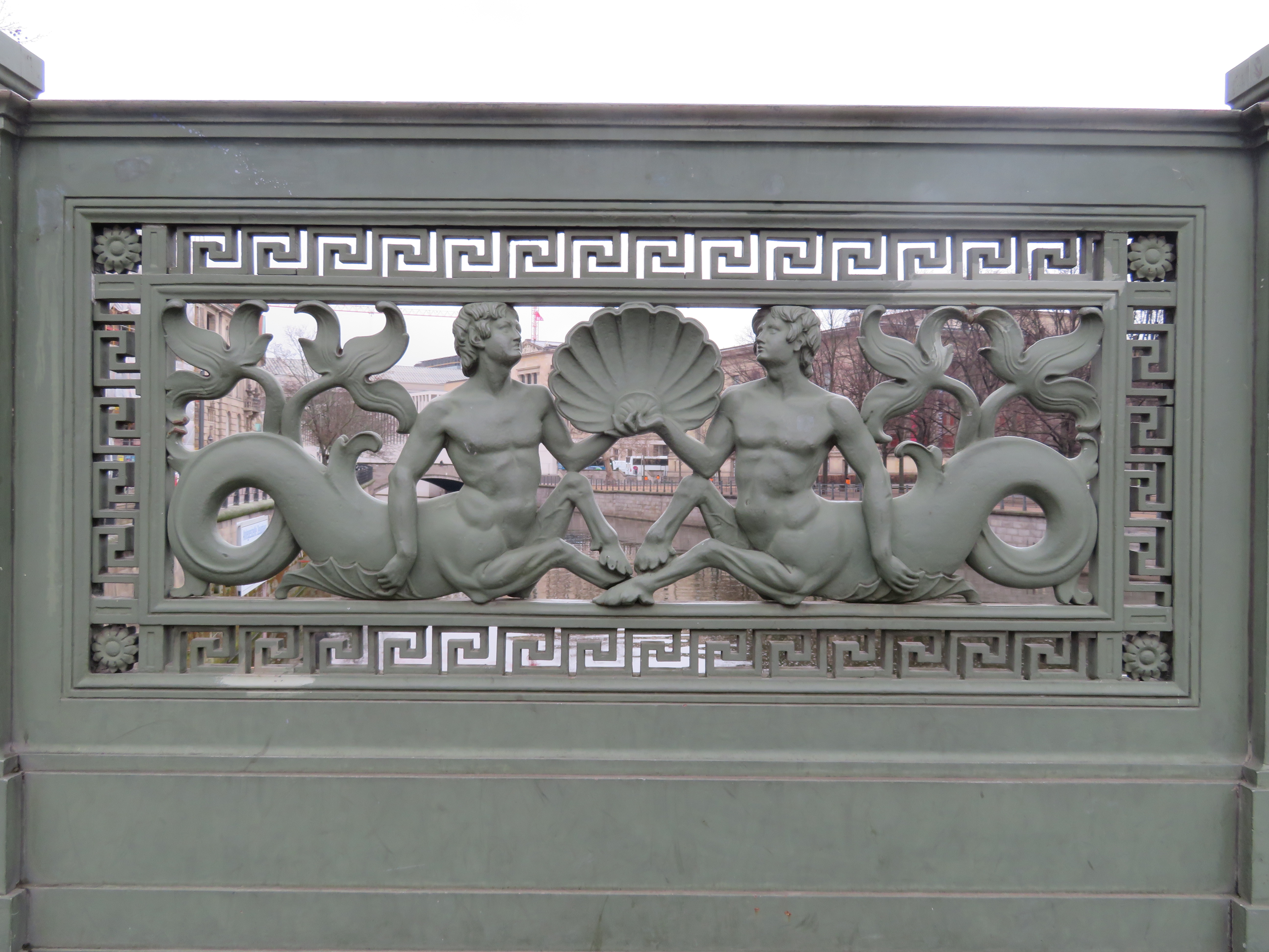 Hauptfeld des Geländers der Berliner Schlossbrücke, nach Schinkels Entwurf